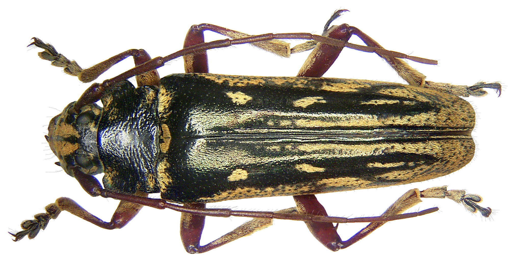 Familie: Cerambycidae Groesse: 22 mm Fundort: Indonesien, Sulawesi, Bua-Kraeng, 1896 Coll. Museum Dresden Foto: U.Schmidt, 2007